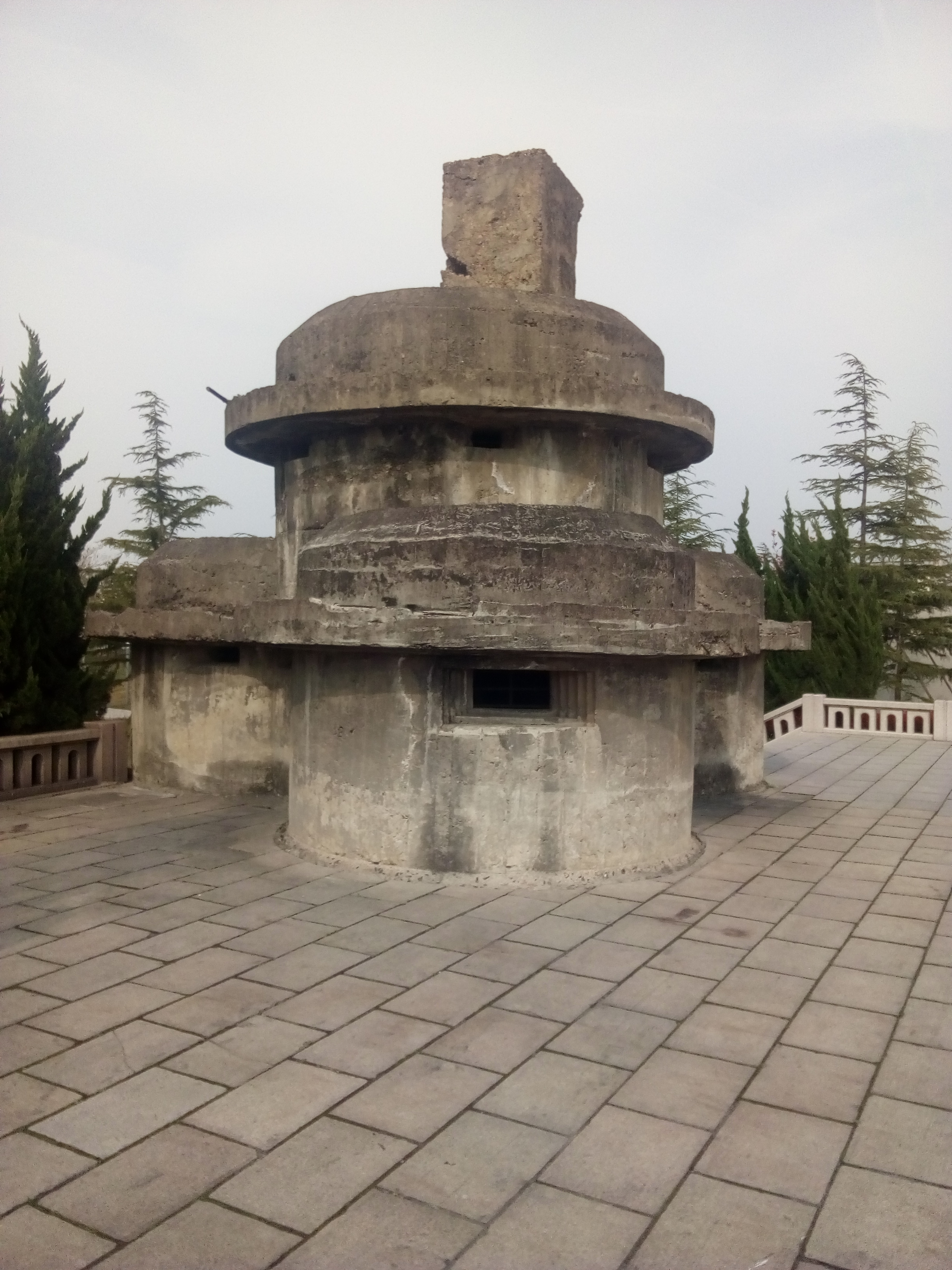 中文（中国大陆）: 漕宝路七号桥碉堡西侧机枪扫射孔